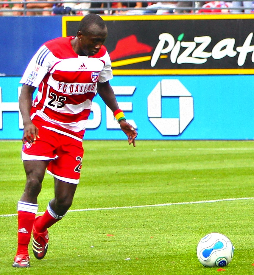 Dominic Oduro, FC Dallas vs. Colorado Rapids, 22 April 2007.